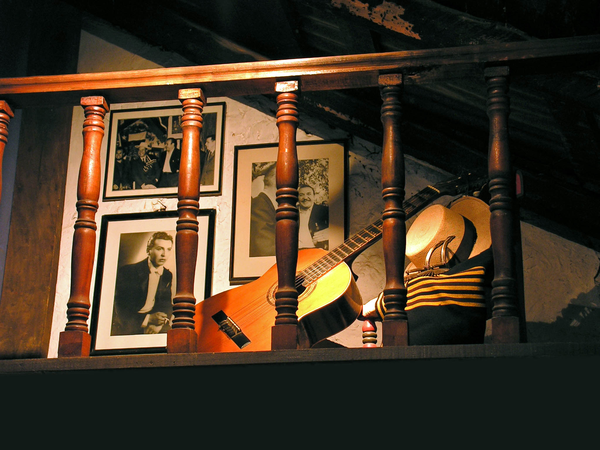 . This is a photo of a national monument in Chile: Unknown